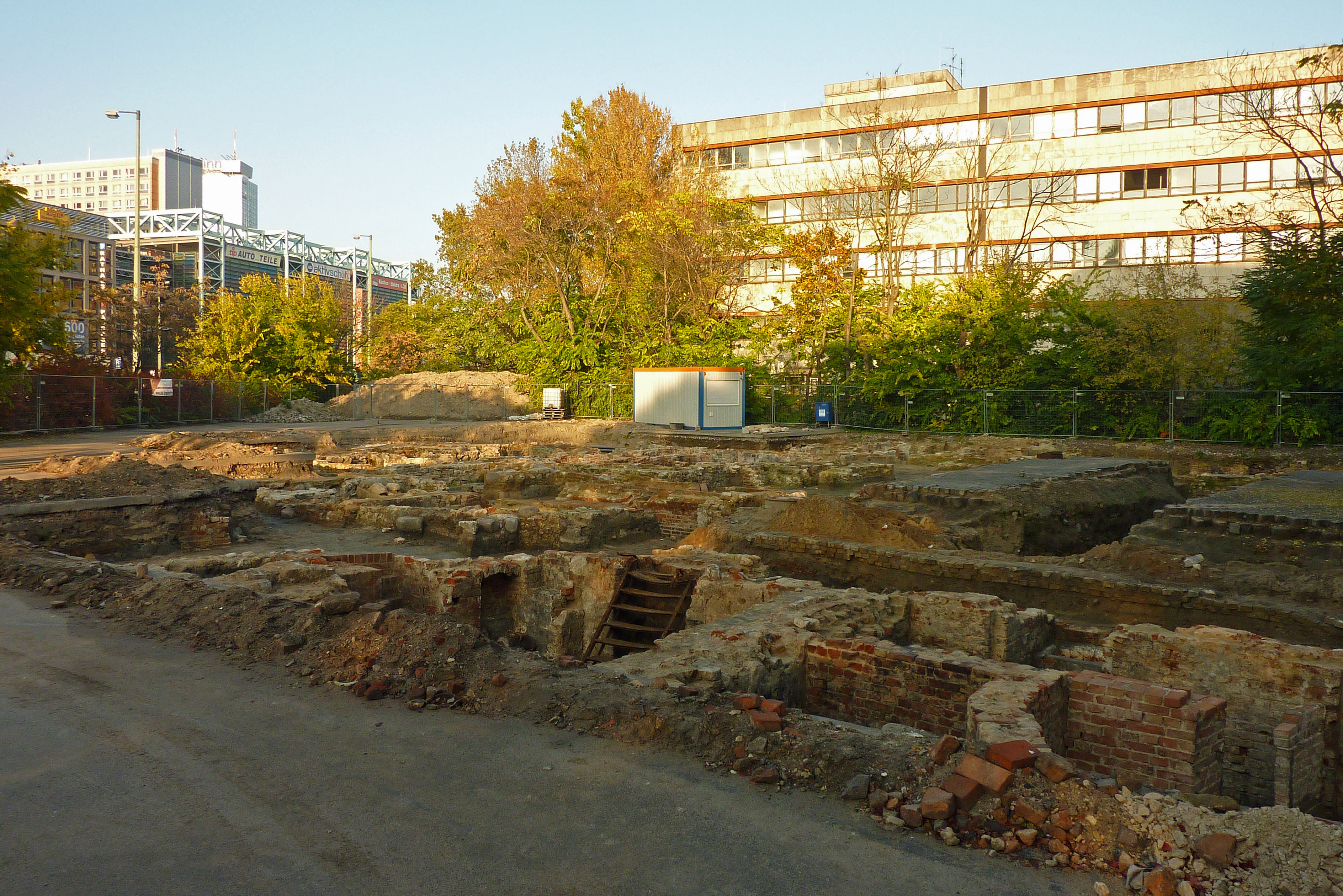 Archäologische Grabung auf dem Gelände des ehemaligen Großen Jüdenhofs in Berlin-Mitte.